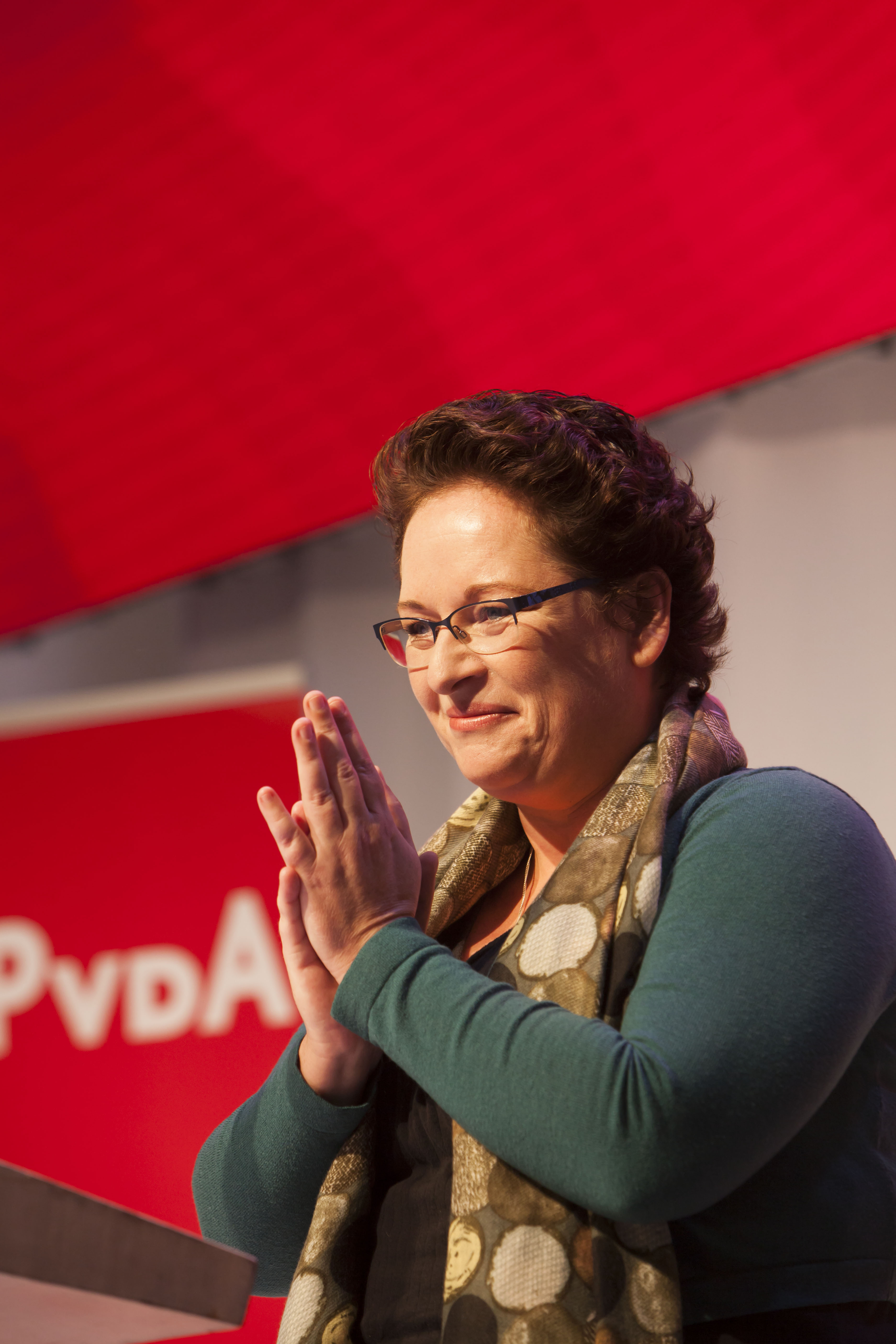 DE BEELDREDAKTIE / MAARTEN HARTMAN T.B.V. DE PVDA NIEUWEGEIN D.D. 07.10.2017 Sfeerbeelden van het PVDA-Congres